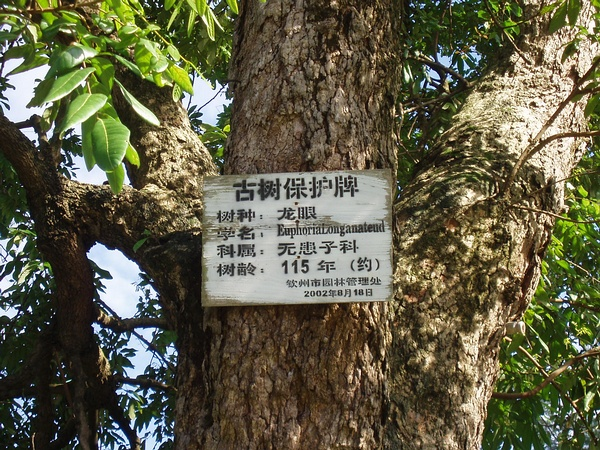 刘永福故居内龙眼树。